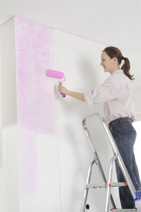 Tapezieren mit Vliestapetenkleister (direct contro von Metylan)